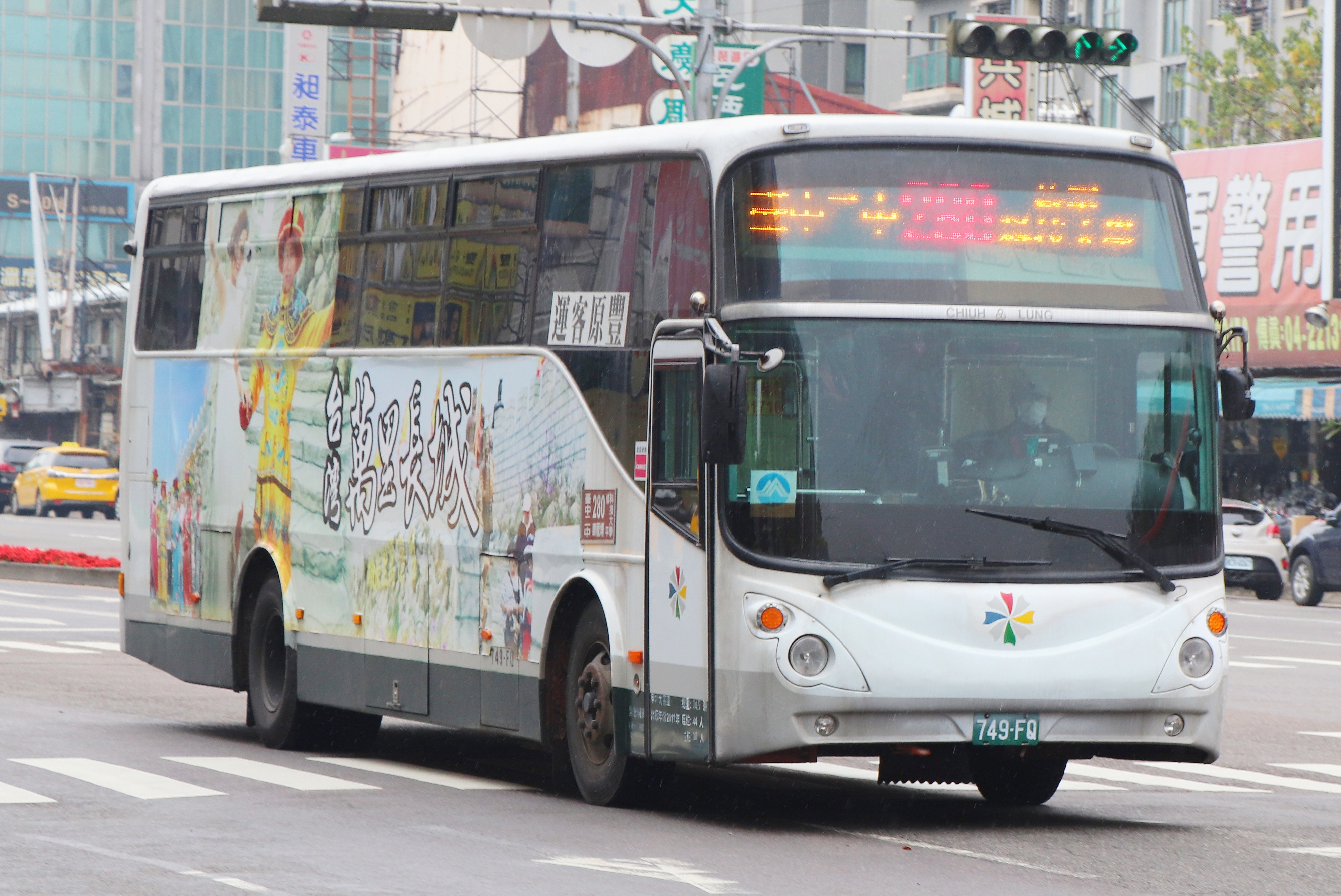 豐原客運 HINO RK8JRSA大客車 749-FQ